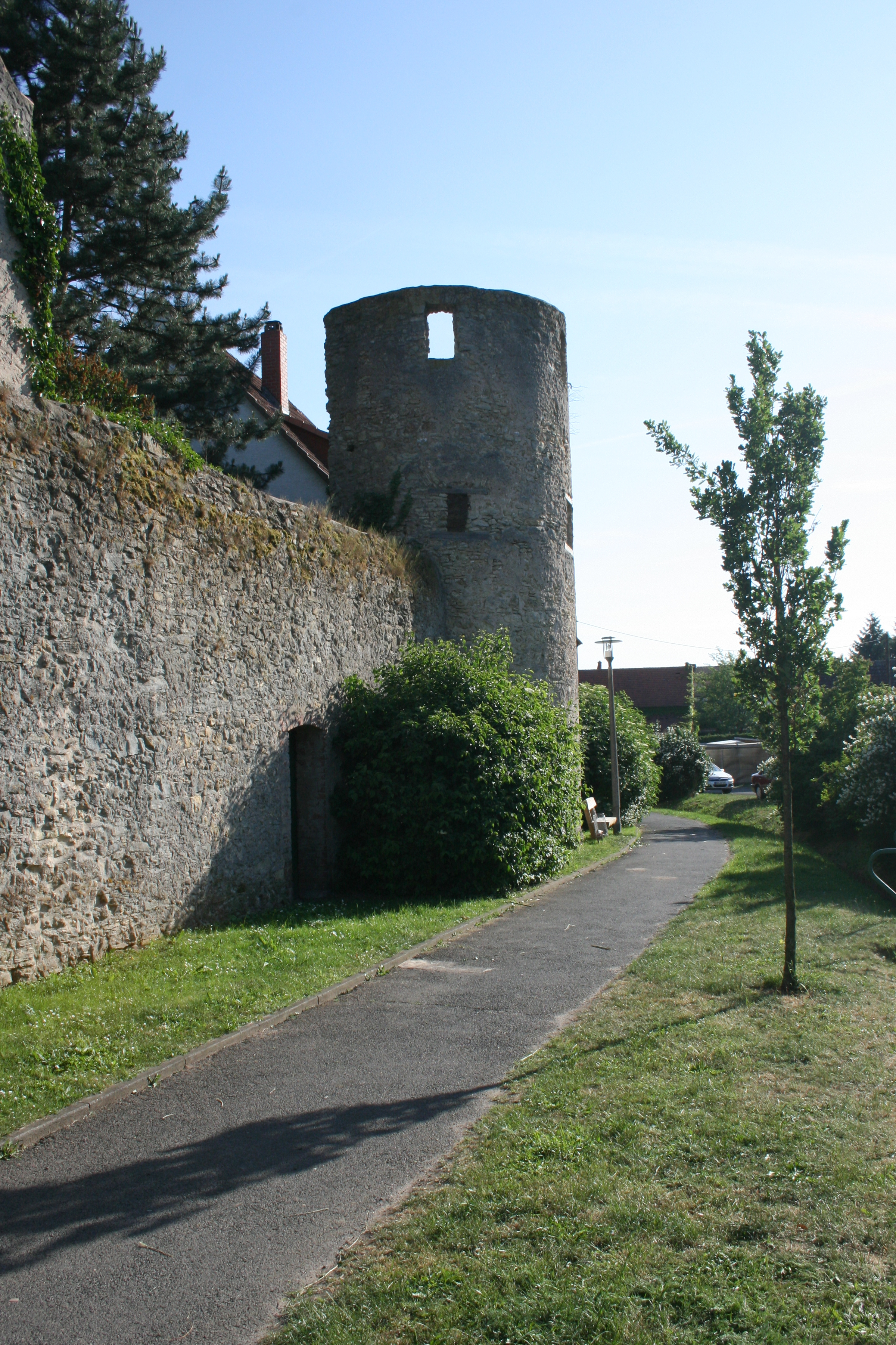 Teil der nördlichen Ringmauer in Maintal-Hochstadt.